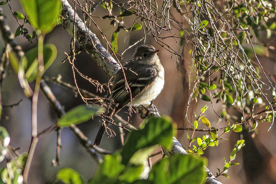 Sierra Baerucu National Park Upper reaches